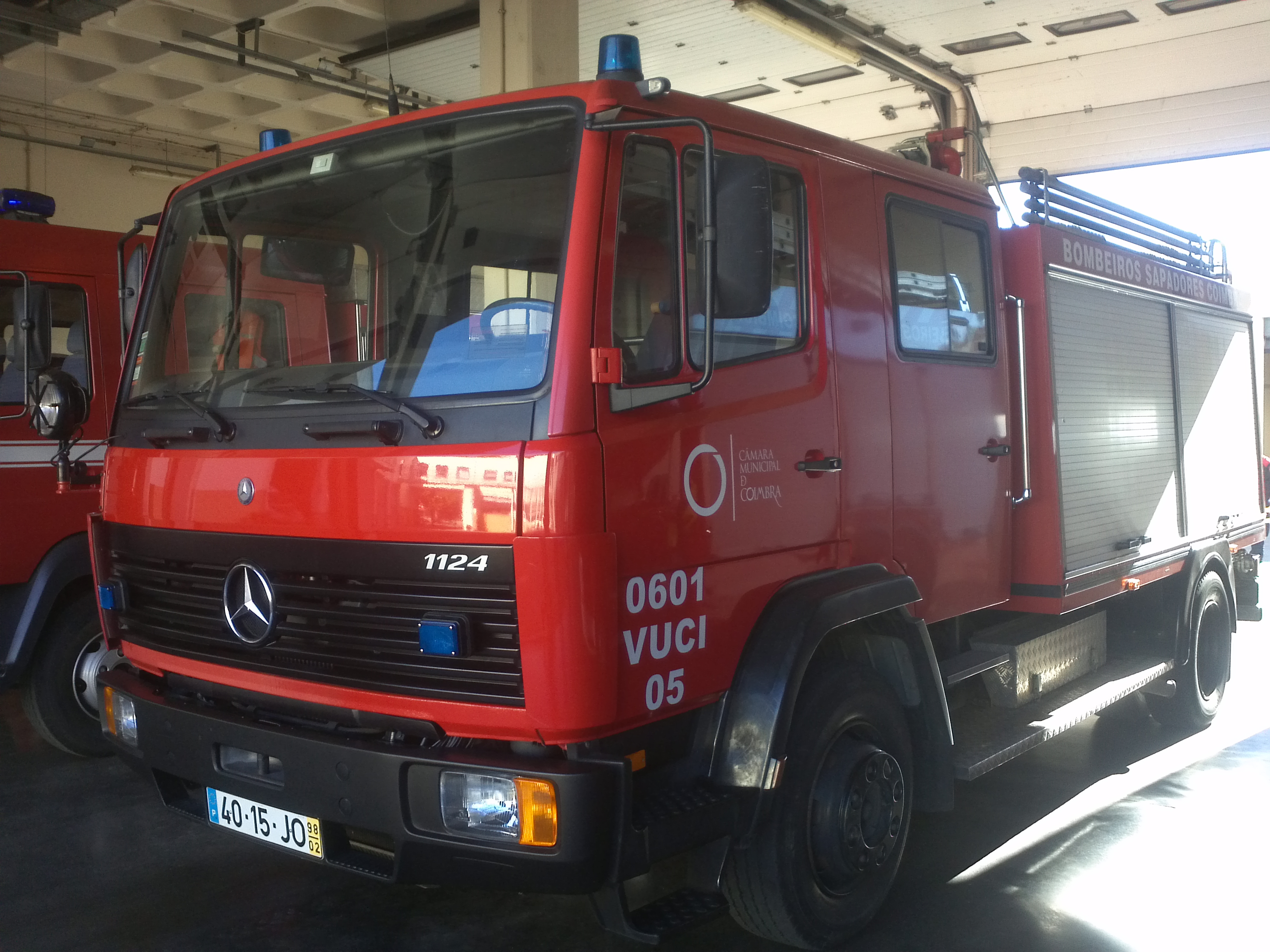 Veiculo Urbano de Combate a Incêndios 05